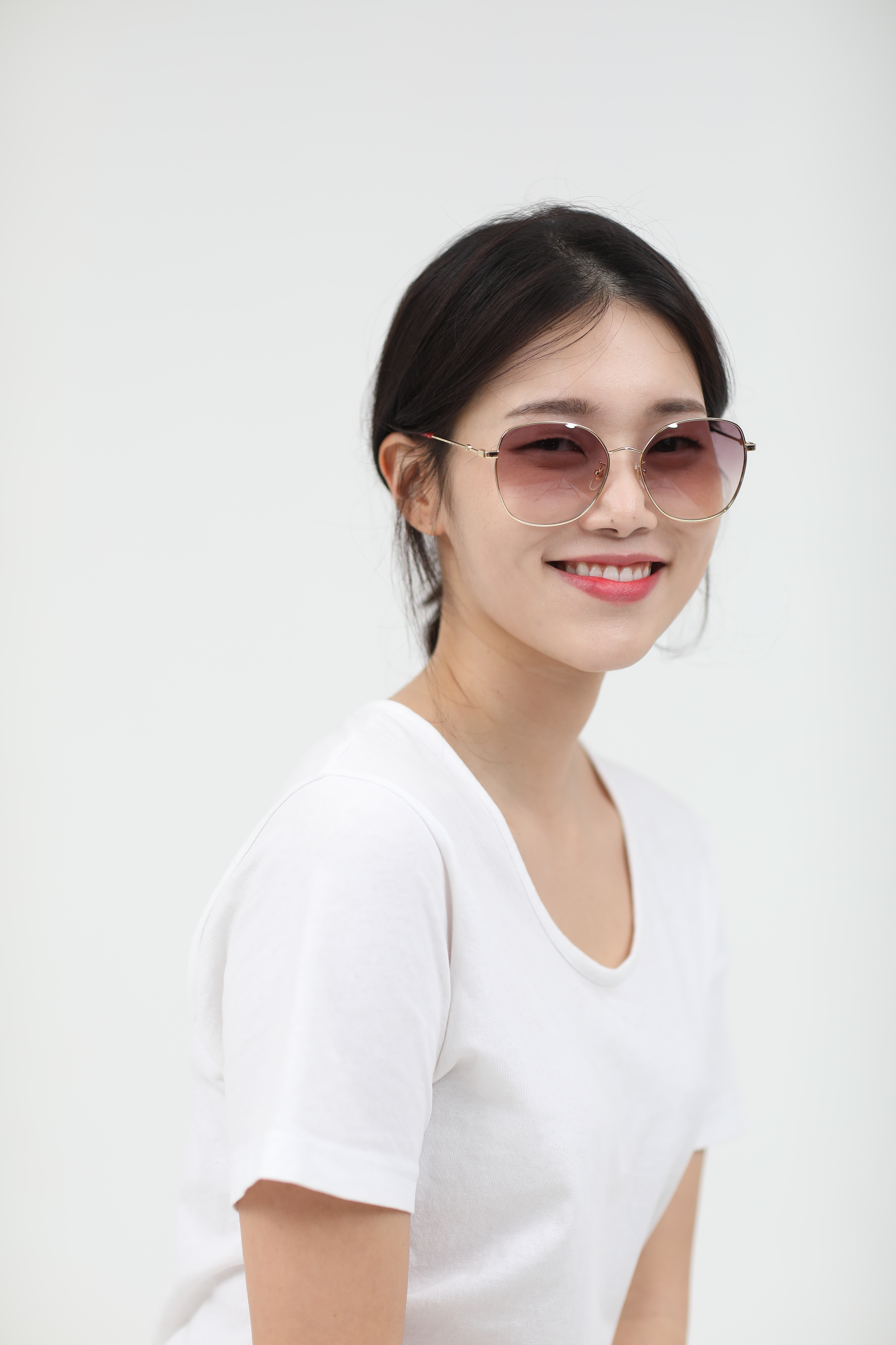 지니스안경_선글라스